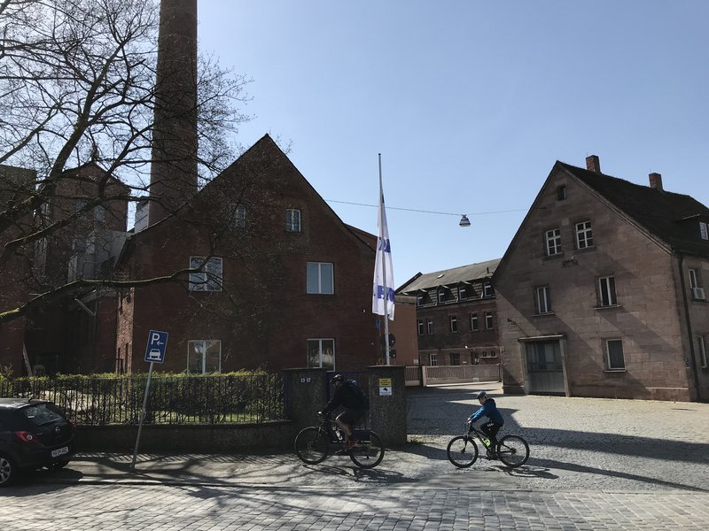 Zufahrt zu den Deutschen Hefewerken in Nürnberg-Buch. Rechts das denkmalgeschützte Gebäude von 1855, Denkmal-Nummer D-5-64-000-265.